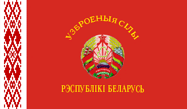 Бойове знамено частин ЗС Білорусі (аверс)